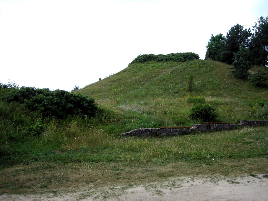 Liškiavos piliakalnis 2006 metai